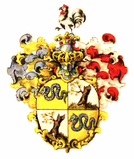 1847 blason de la famille von l'estocq.